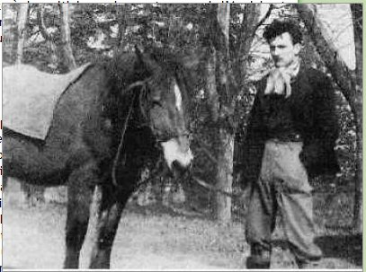 Un cheval d'Auvergne, vers 1900